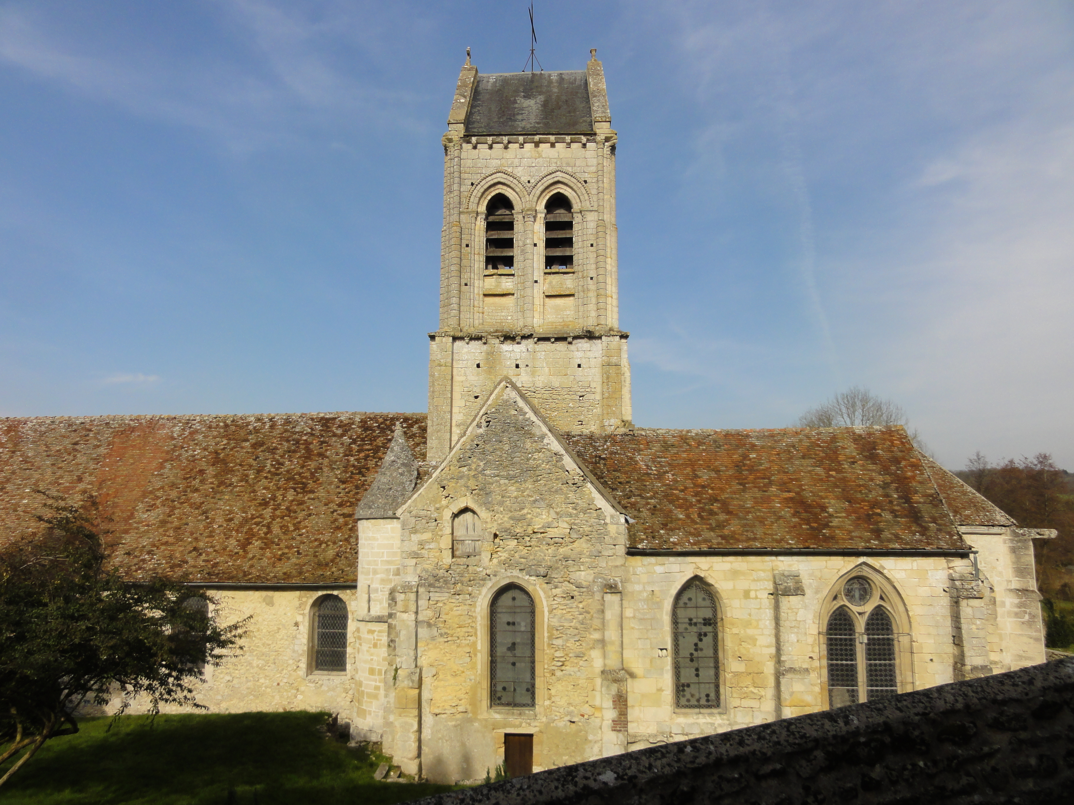 Église Saint-Léger de Delincourt - voir titre.